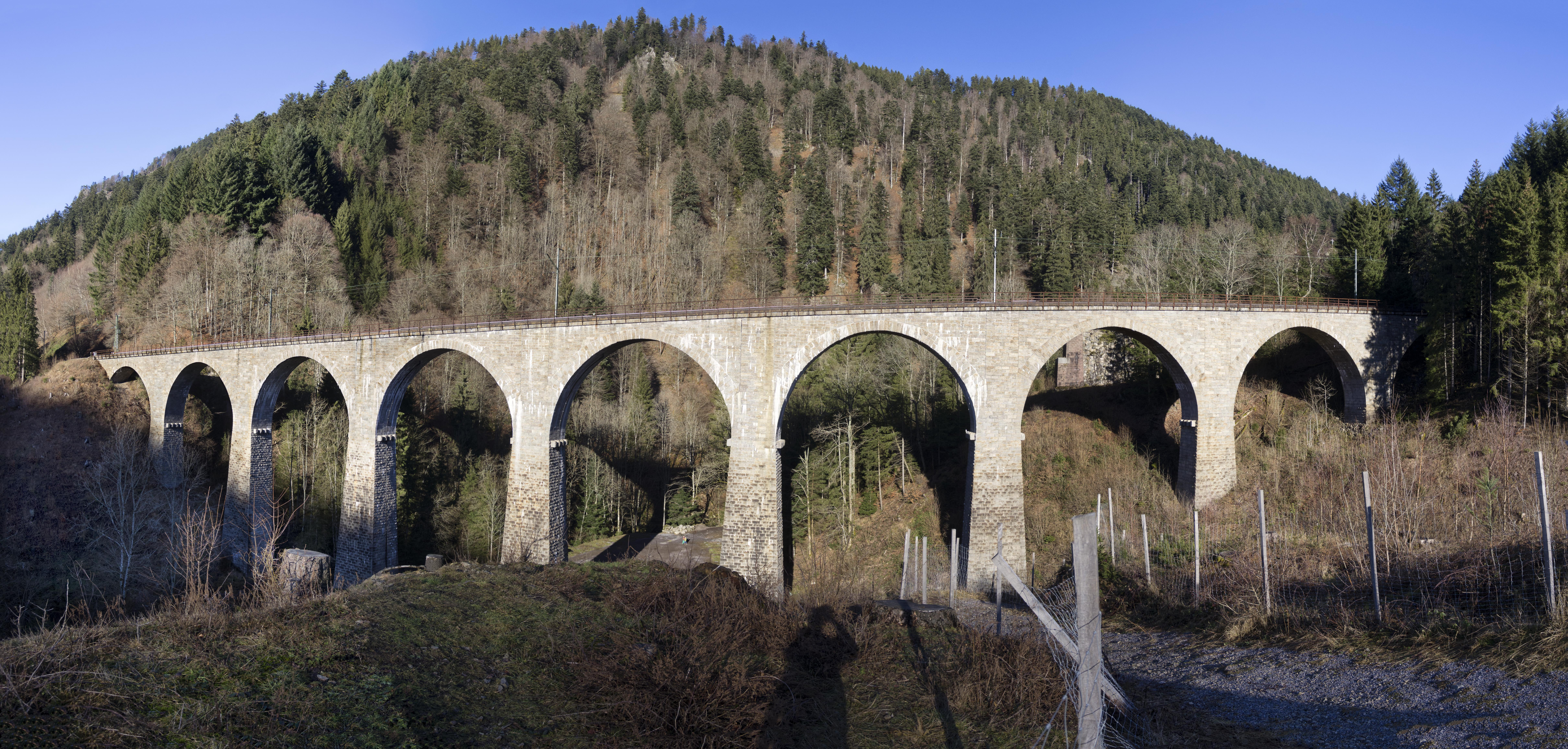 Bilder entlang der B31